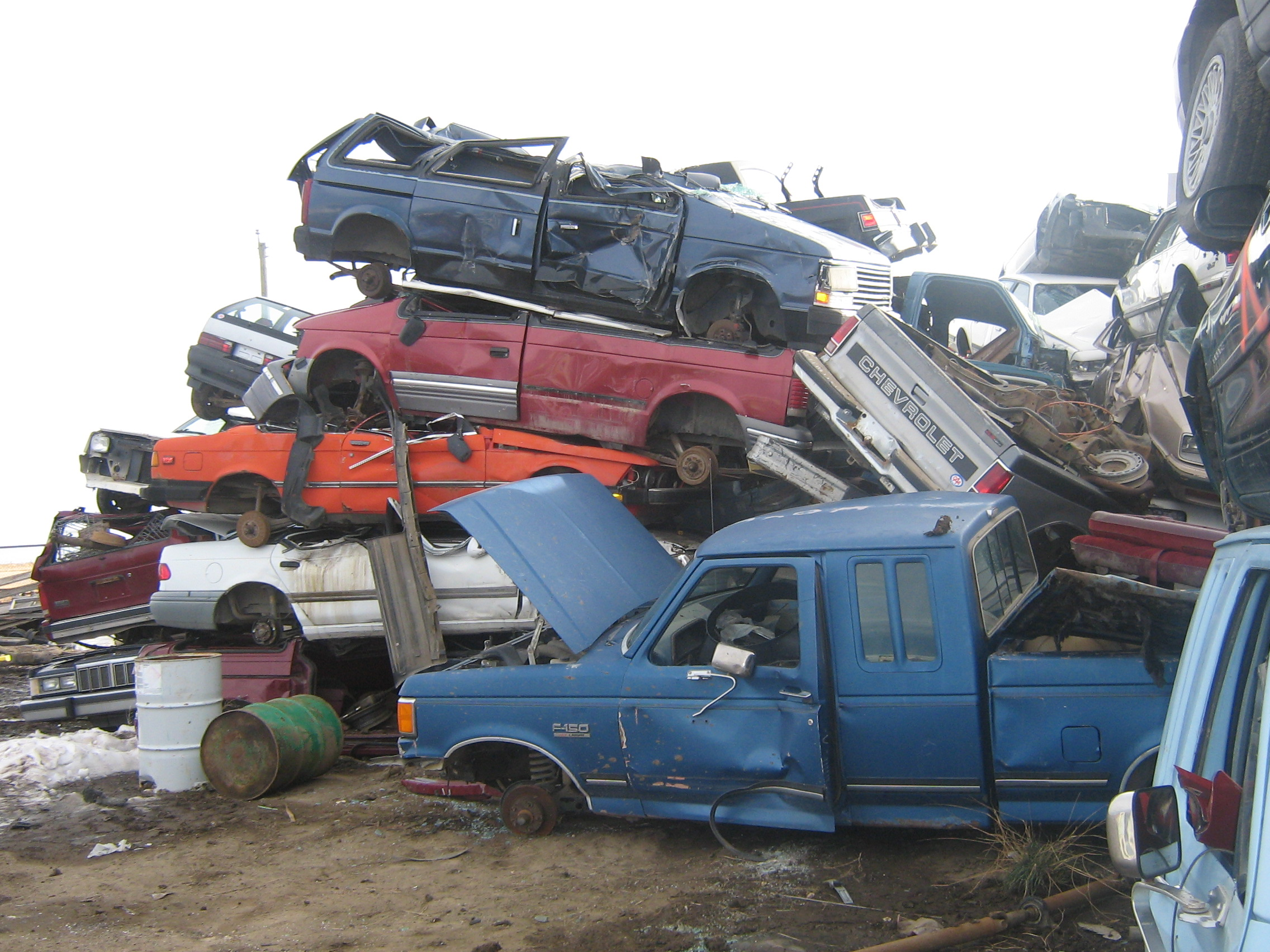 Junkyard